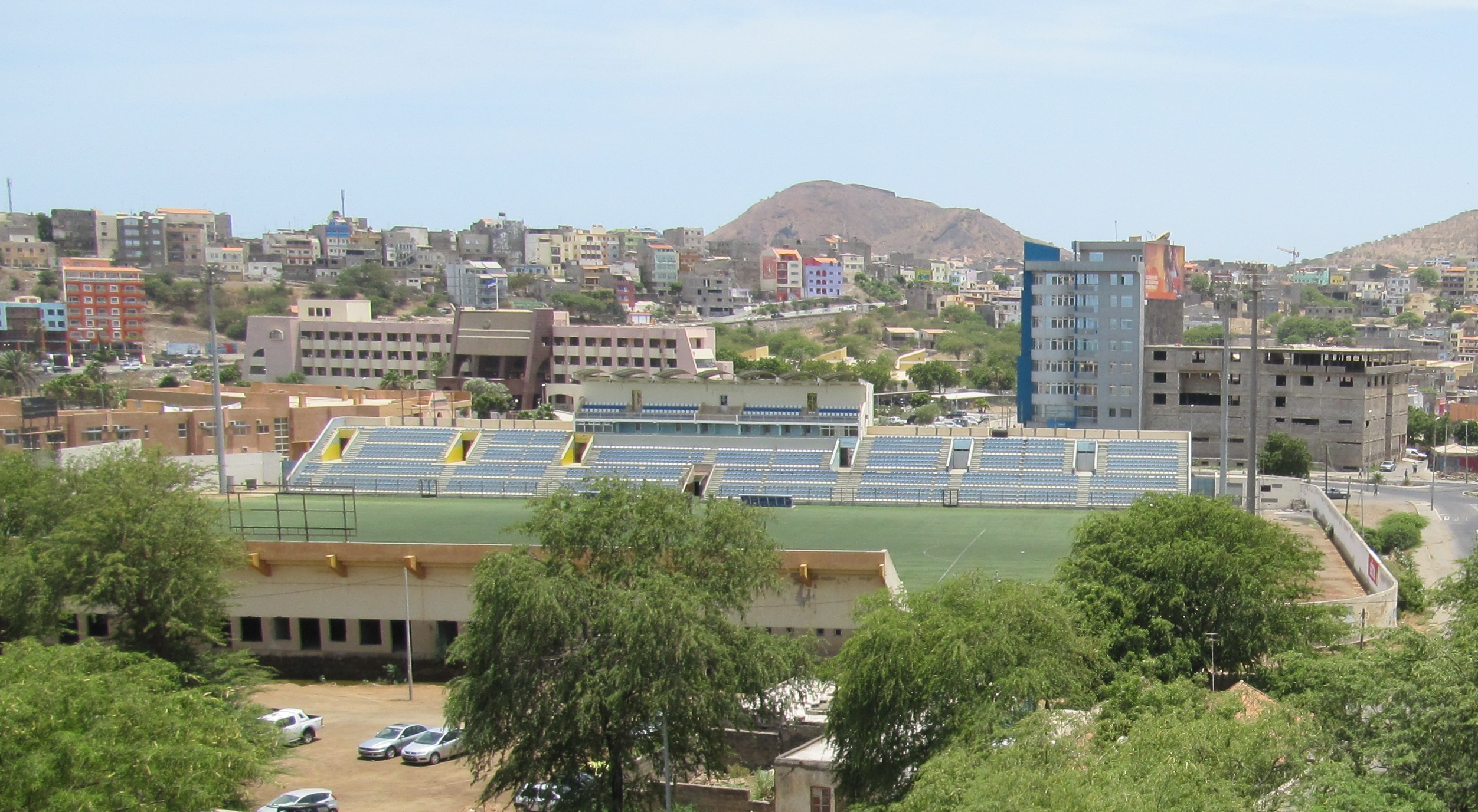 Vista Estadio de Várzea